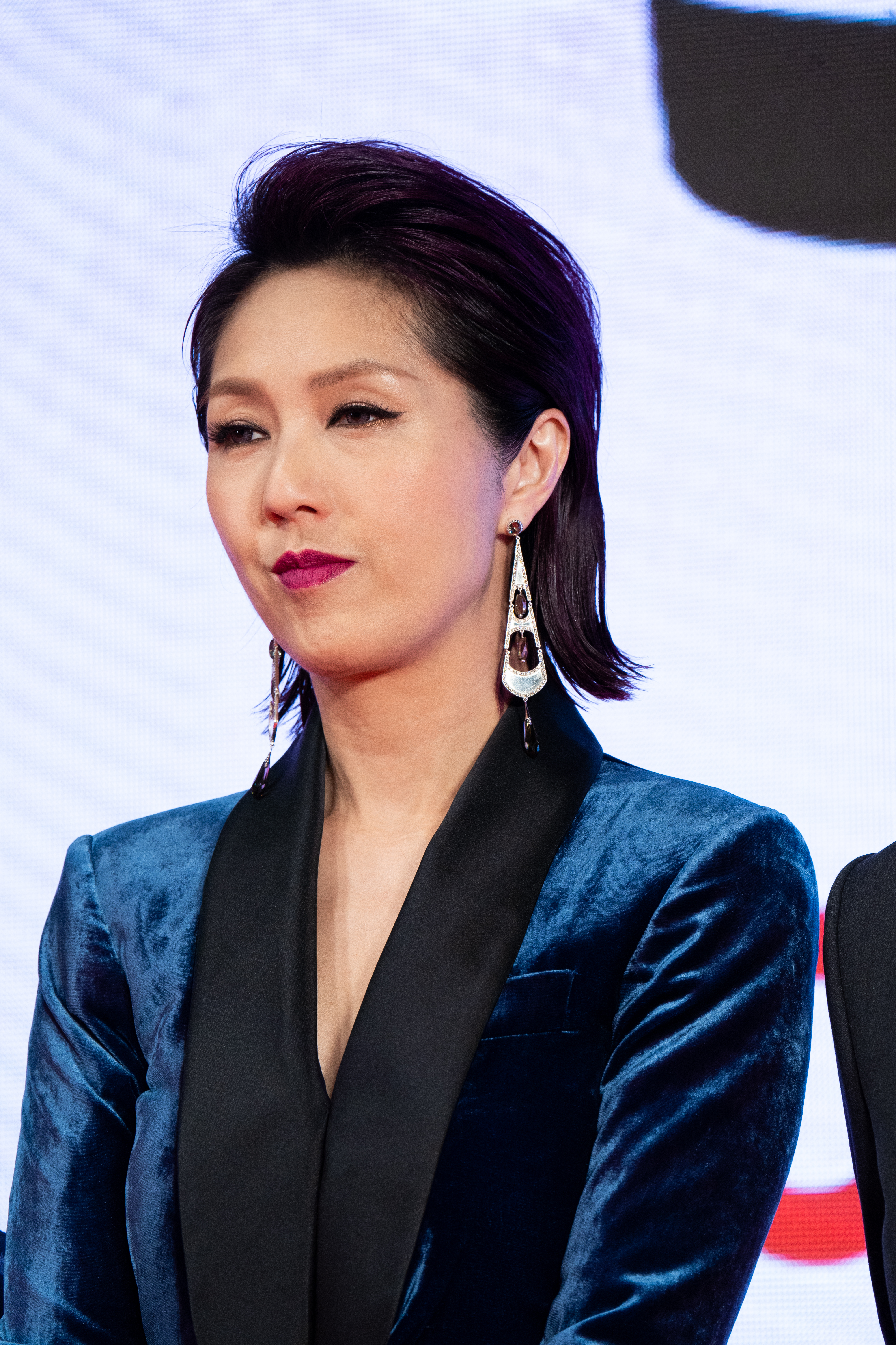 第32回 東京国際映画祭 オープニングセレモニー ミリアム・ヨン (ファストフード店の住人たち)